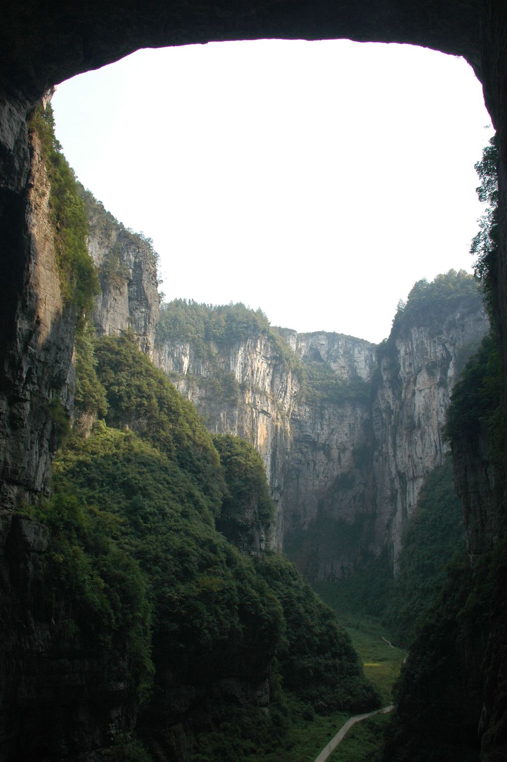 重庆武隆的天生三桥中的天龙桥，世界自然遗产武隆喀斯特的组成部分